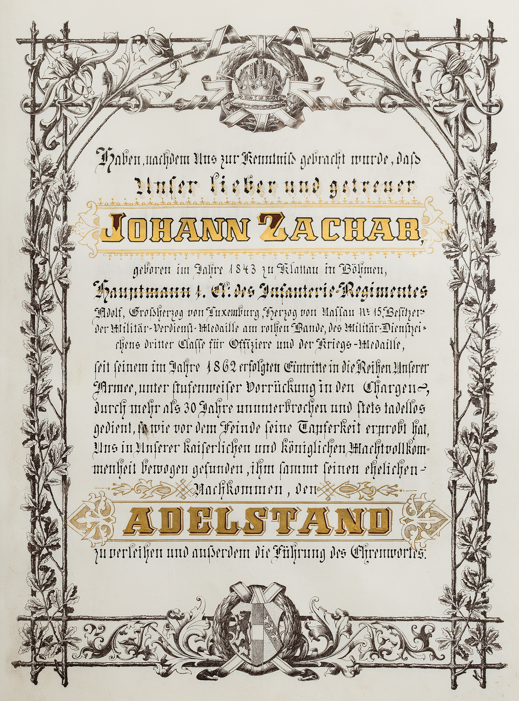 Seite aus dem Adelsdiplom von Franz Joseph I. (Kaiser von Österreich 1848-1916) für Hauptmann Johann Zachar, mit Verleihung des Prädikates "Edler von Radimil" aufgrund mehr als 30-jähriger Dienstzeit. Ausgestellt Wien 1893, mit eigenhändiger Unterschrift des Kaisers, Gegenzeichnung Eduard Graf Taaffe. Pergamentlibell (Format ca. 38 x29 cm), teils goldgehöhte Kalligraphie, gedruckte Bordüre. Wappendarstellung signiert "Carl Boess". Violetter Samteinband mit goldgeprägter Doppeladlerdarstellung, anhängendes Siegel in Messingkapsel. Adelsdiplom und Unterlagen in Metallkassette (Format 53 x 30 cm).